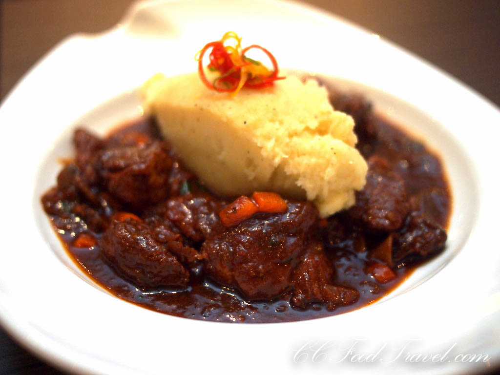 Marhapörkölt